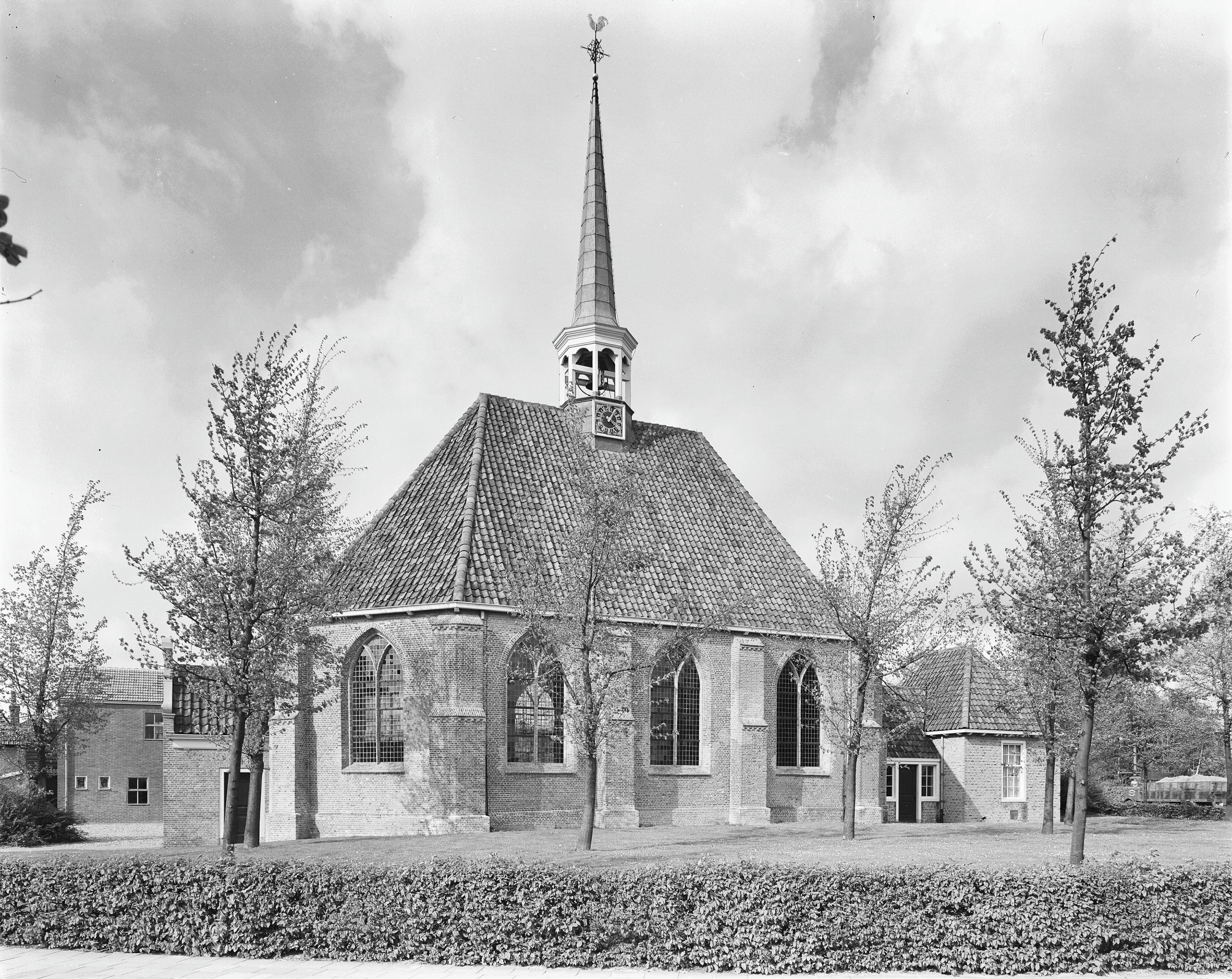 N.H.Kerk: zuid-gevel